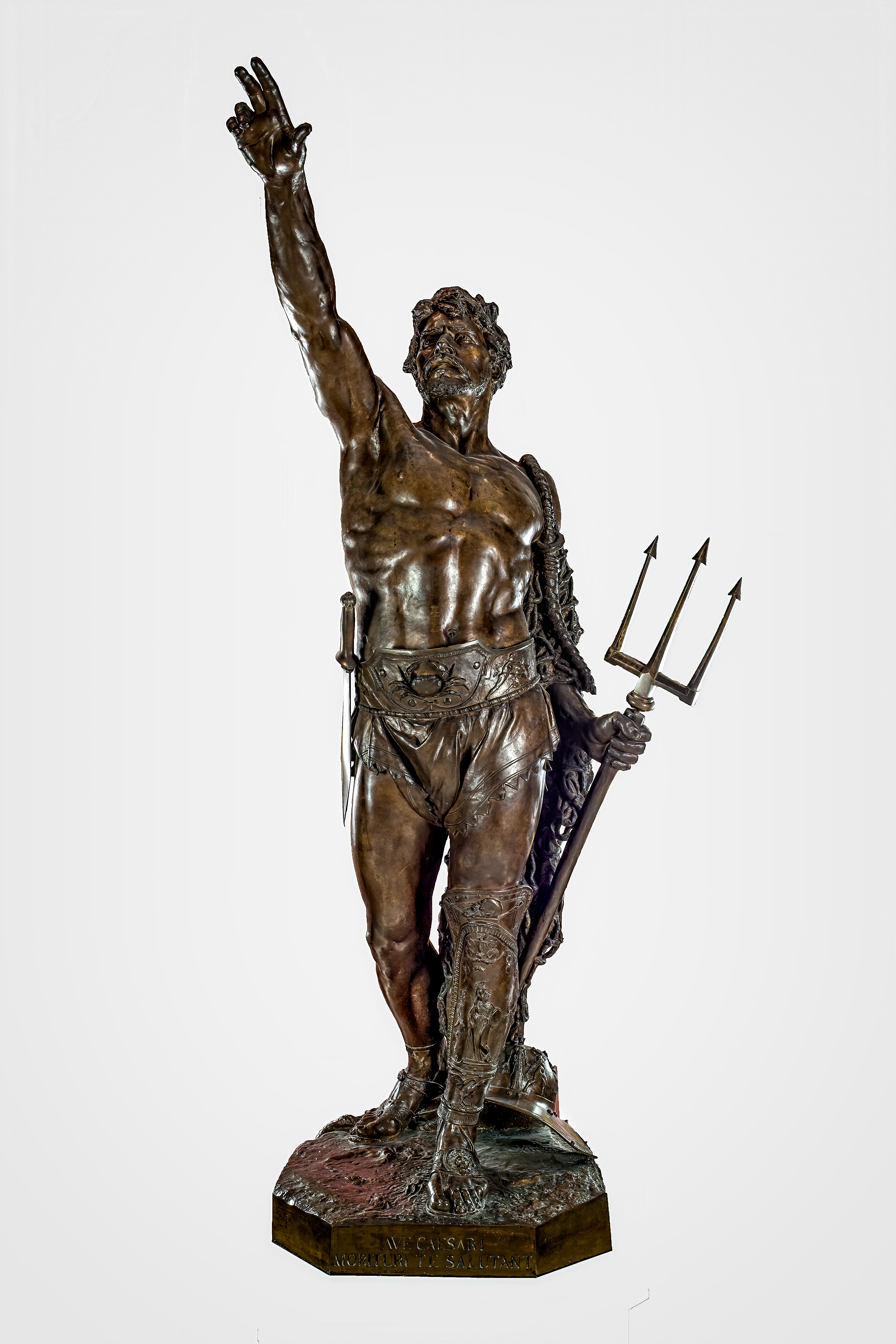 Gladiator in National Museum in Kraków